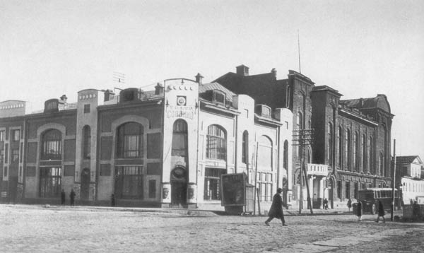 Главный проспект (Ленина). На углу - кинотеатр. 1907. Архитектор К.А.Полков. Рядом по Главному проспекту - Коммерческое собрание (клуб приказчиков). 1915. Архитектор Лебединский. Фотография 20-х годов ХХ века.